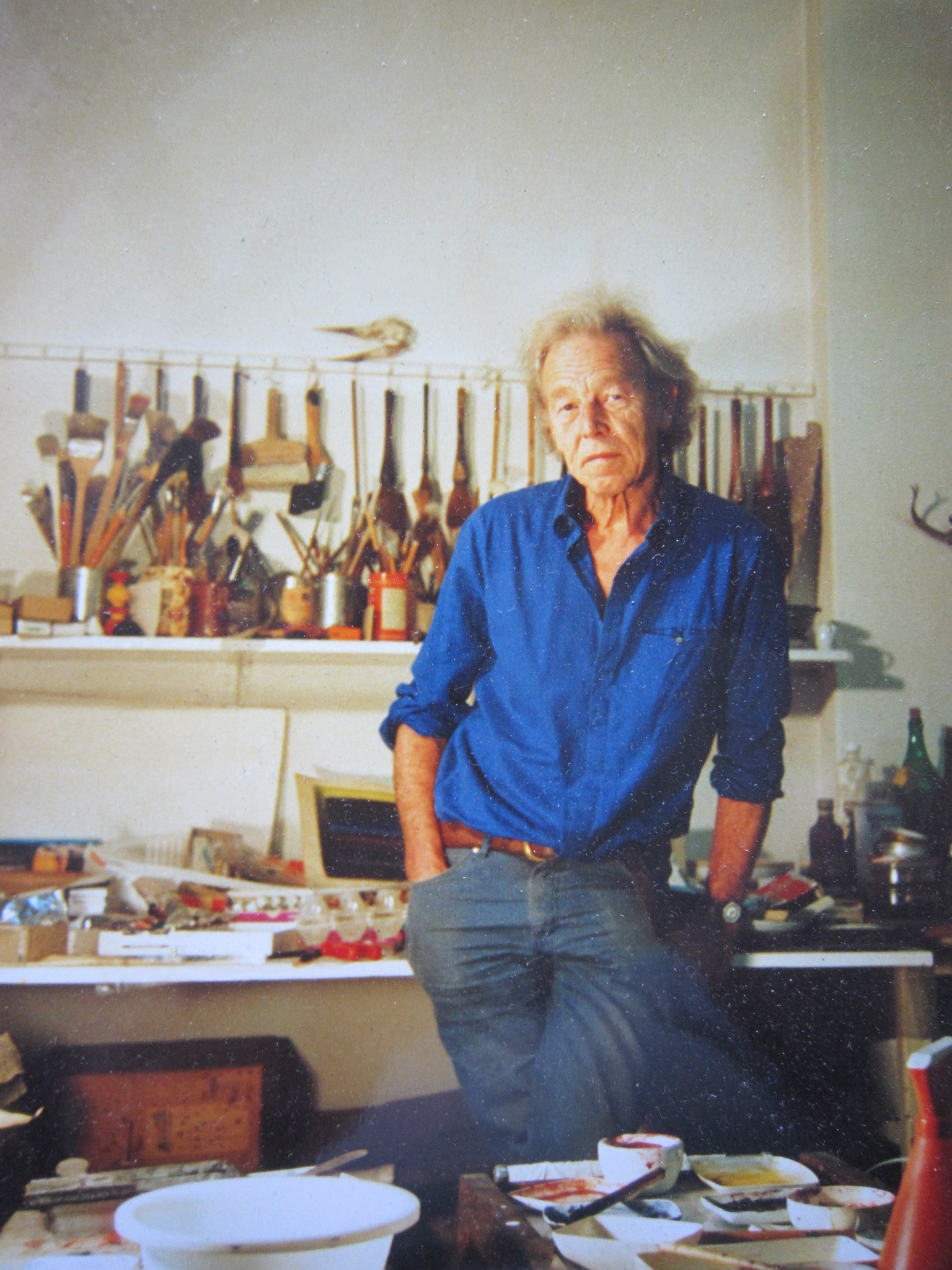 Georg W. Brosche